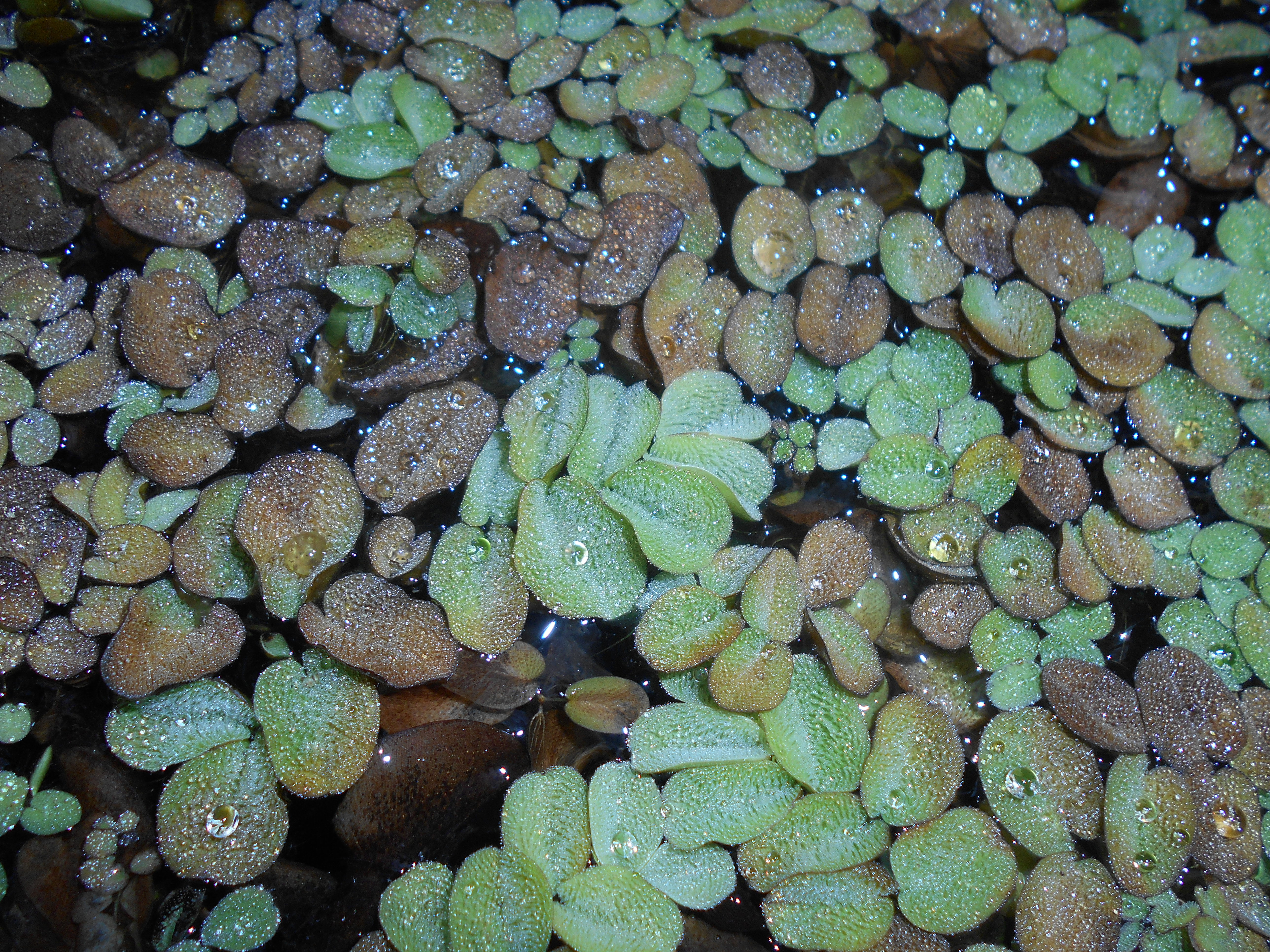 Salvinia biloba, Botanischer Garten Berlin.